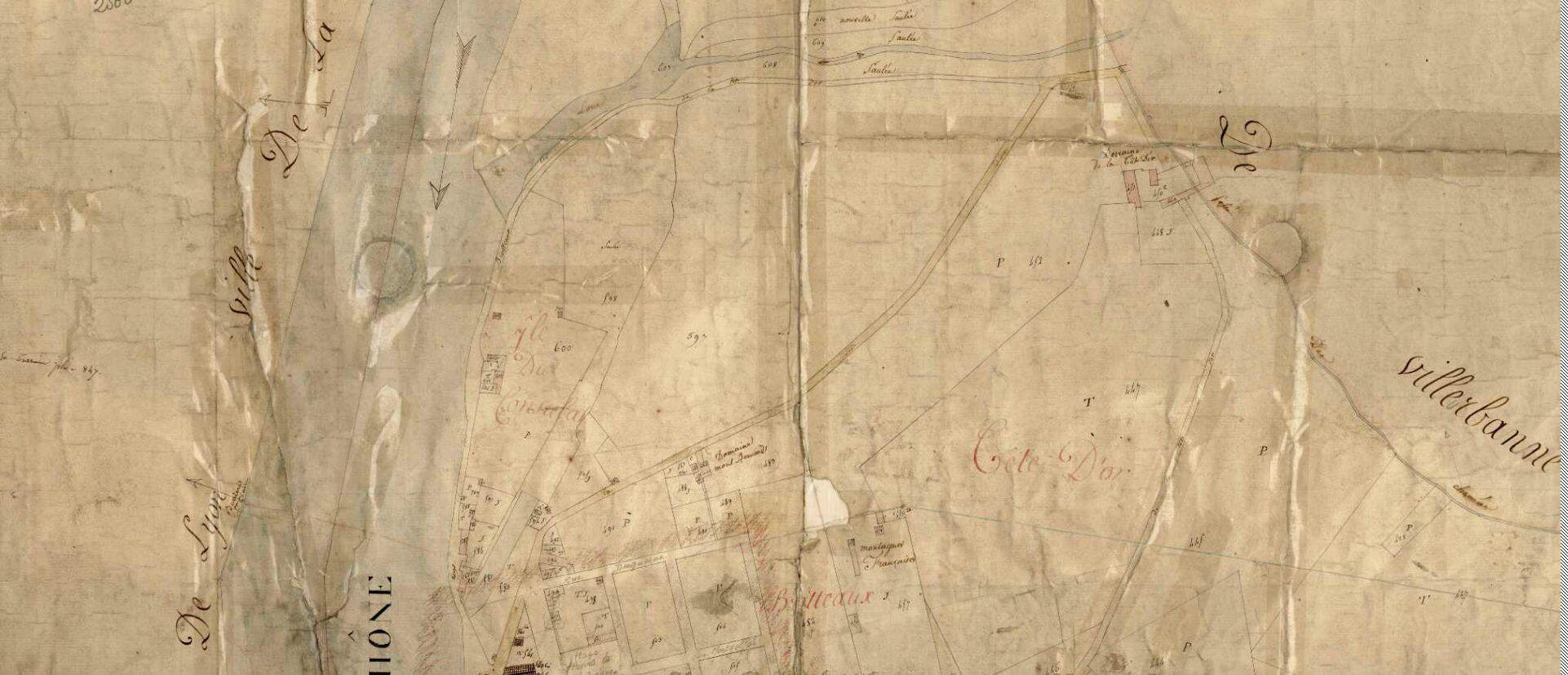 Extrait du Cadastre de Lyon levé en 1835. Quartier de la Guillotière, section A dite des Brotteaux, extrait de la feuille représentant les parcelles 421 à 614.